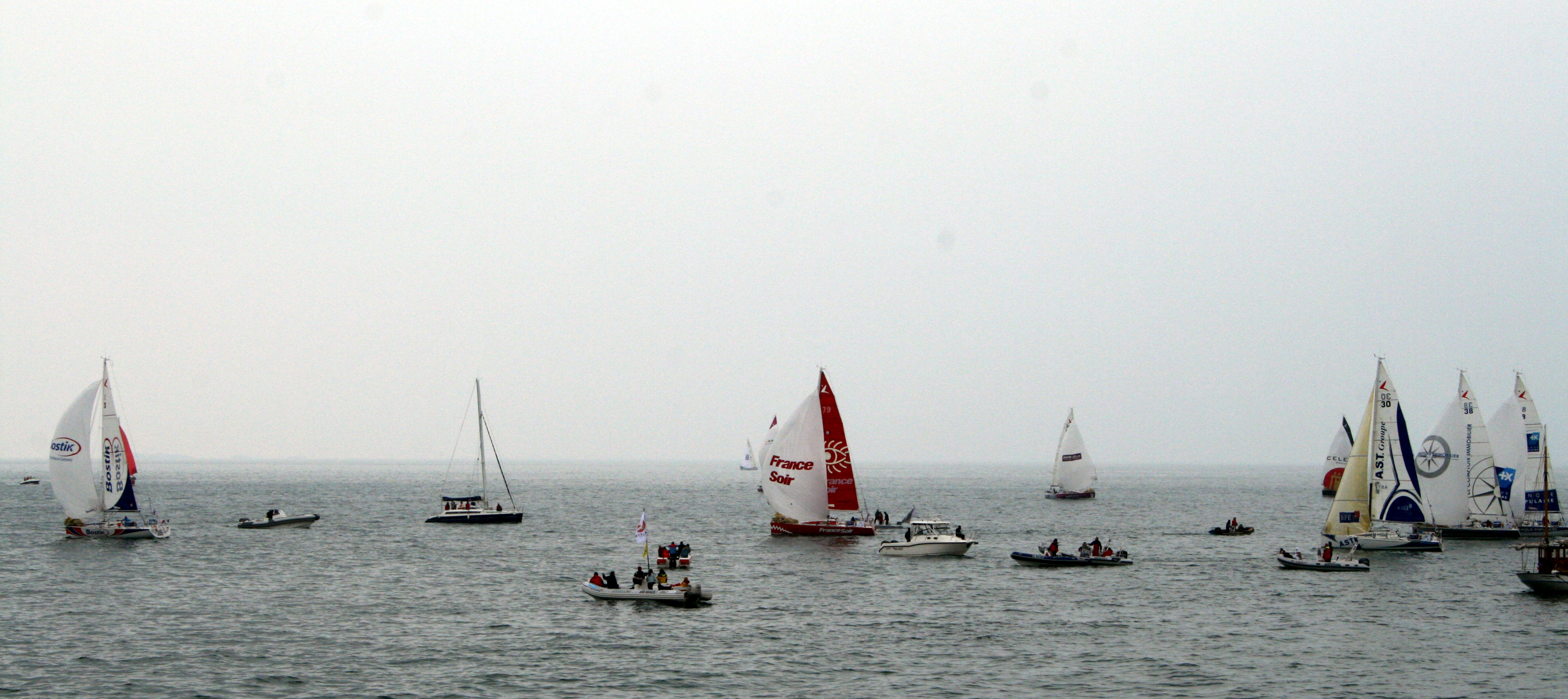 Trophee BPE à Belle-Ile